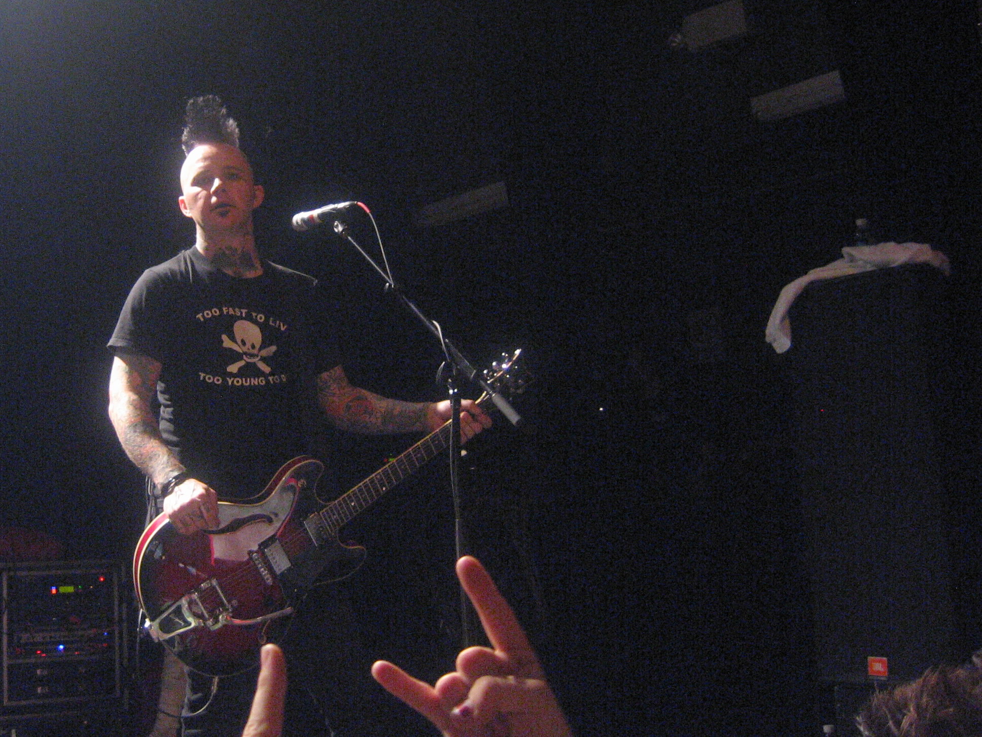 HorrorPops, taken in Montréal, Québec